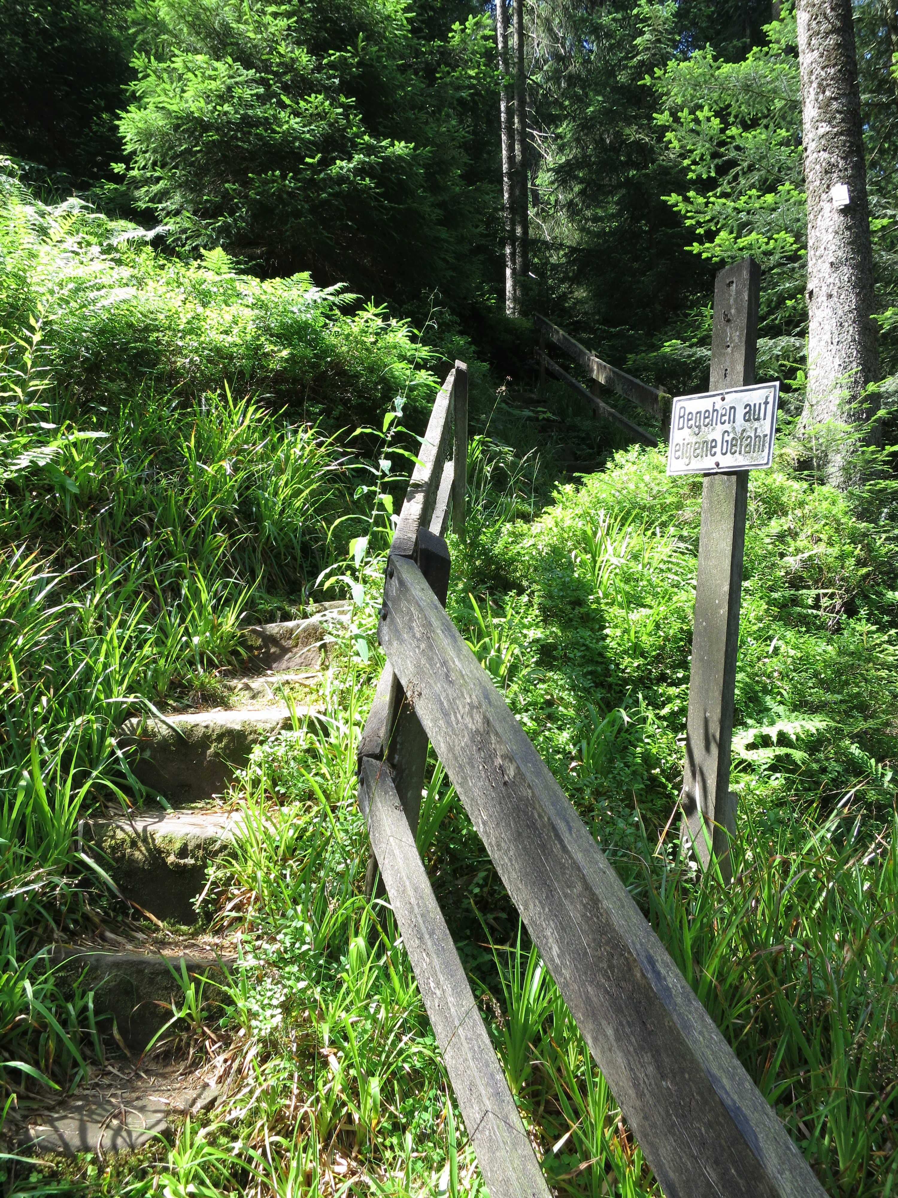 Weg durch die Teufelskanzel bei Bad Griesbach im Schwarzwald.